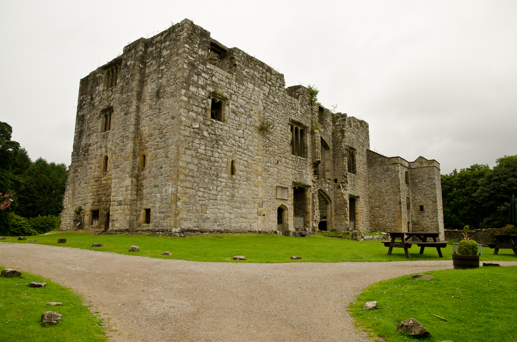 Barden Tower